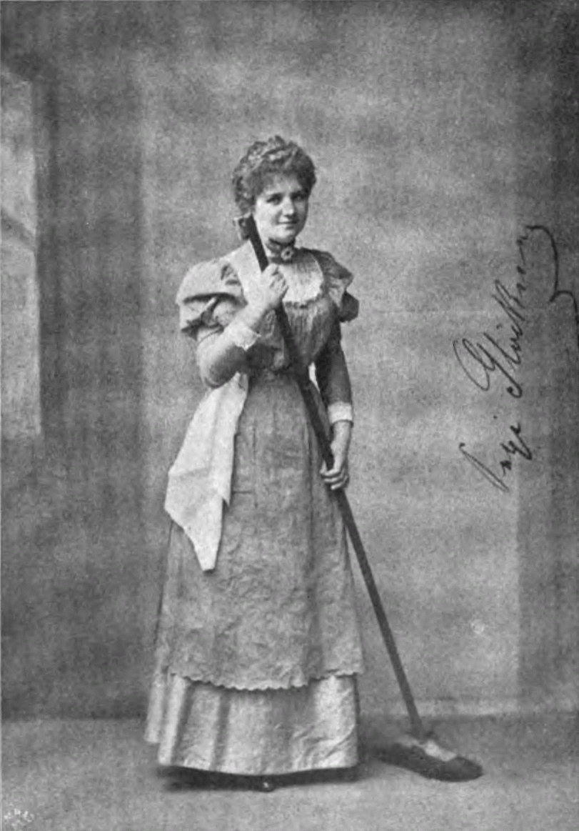 Pepi Glöckner Josefine Kramer-Glöckner (1874–1954), Austrian vocalist and actress